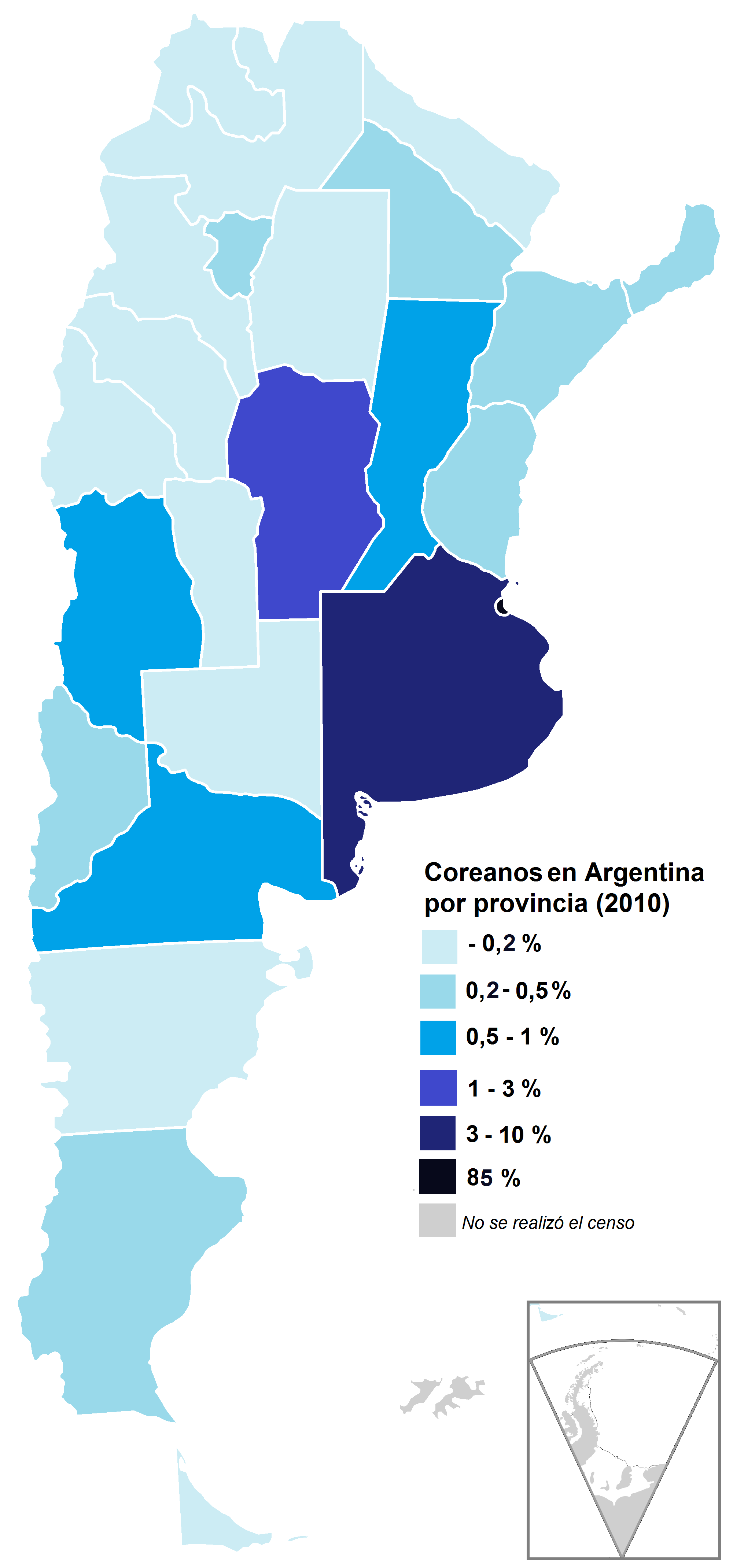 República Argentina por provincia. Población nacida en Corea del Sur (y del Norte), en porcentaje. Año 2010. Fuente: Censo 2010 - INDEC.